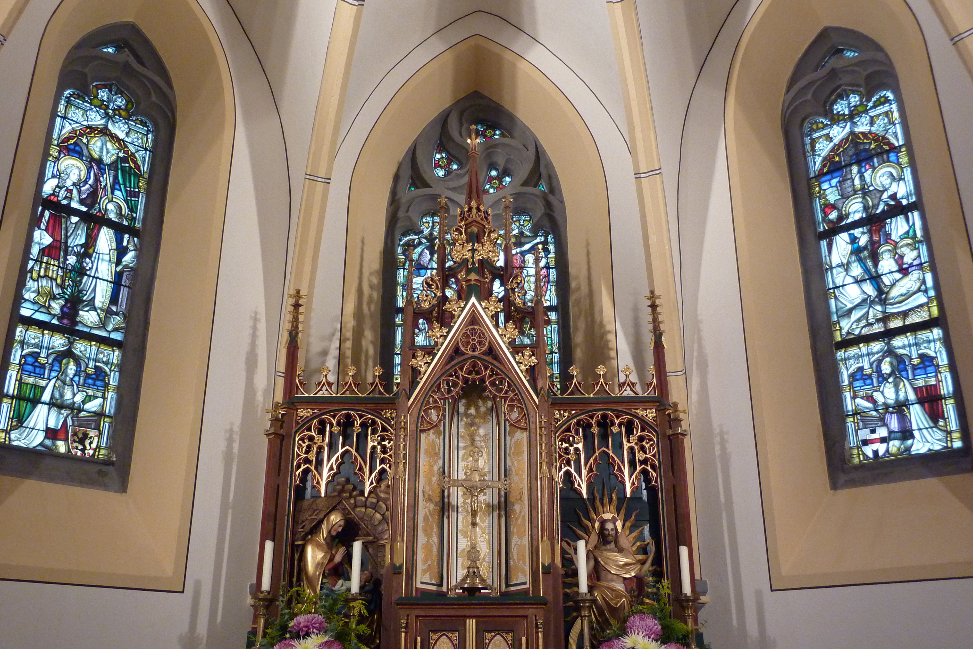 Katholische Pfarrkirche St. Nikolaus in Nürburg, Chor mit drei Bleiglasfenstern, linkes Fenster: Verkündigung, mittleres Fenster: Kreuzigung, rechtes Fenster: Geburt Christi